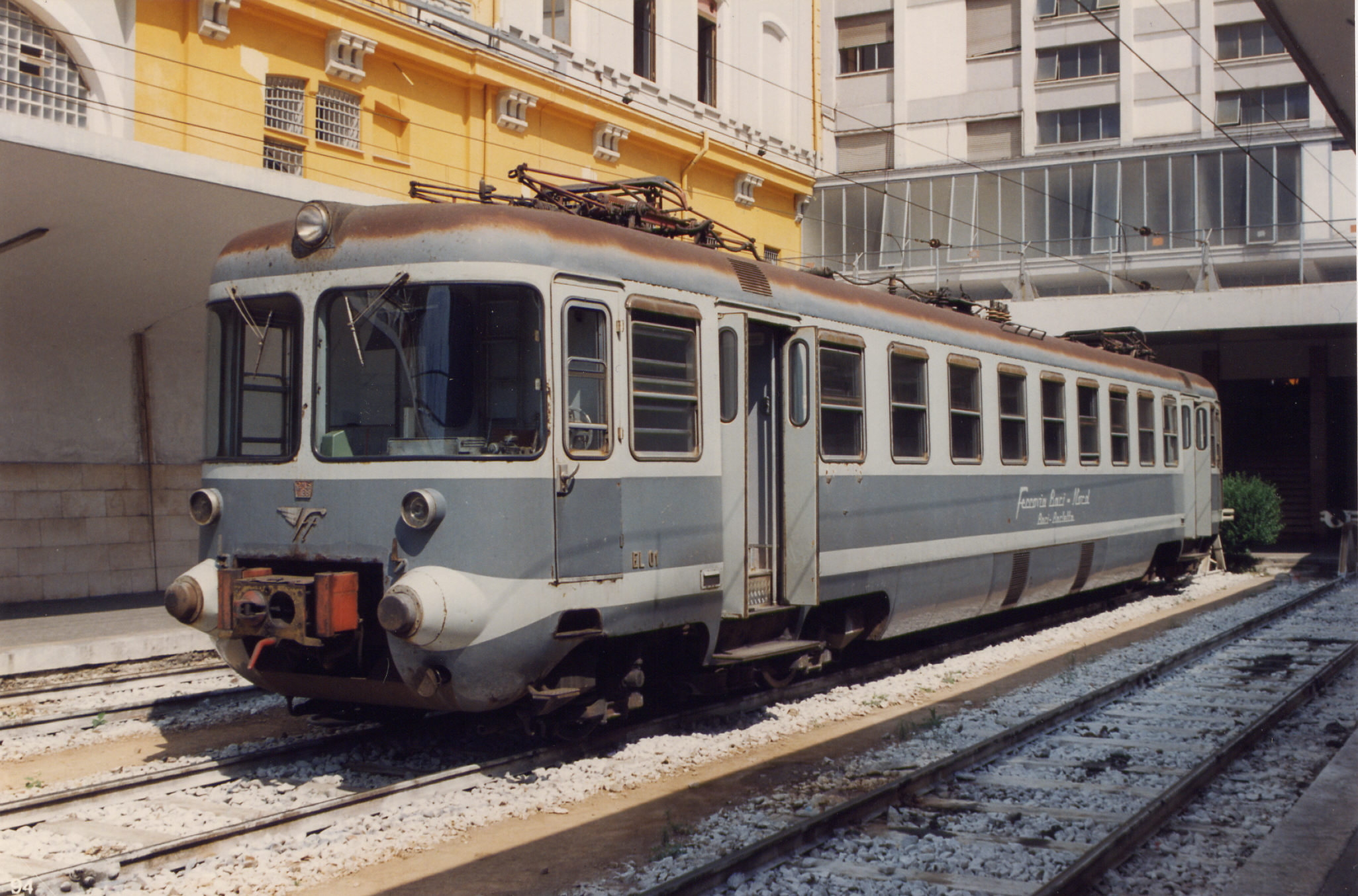 Elettromotrice EL.01 della Ferrotramviaria, in sosta a Bari